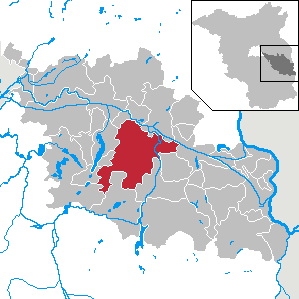 Rietz-Neuendorf in Brandenburg (Country) - District Oder-Spree